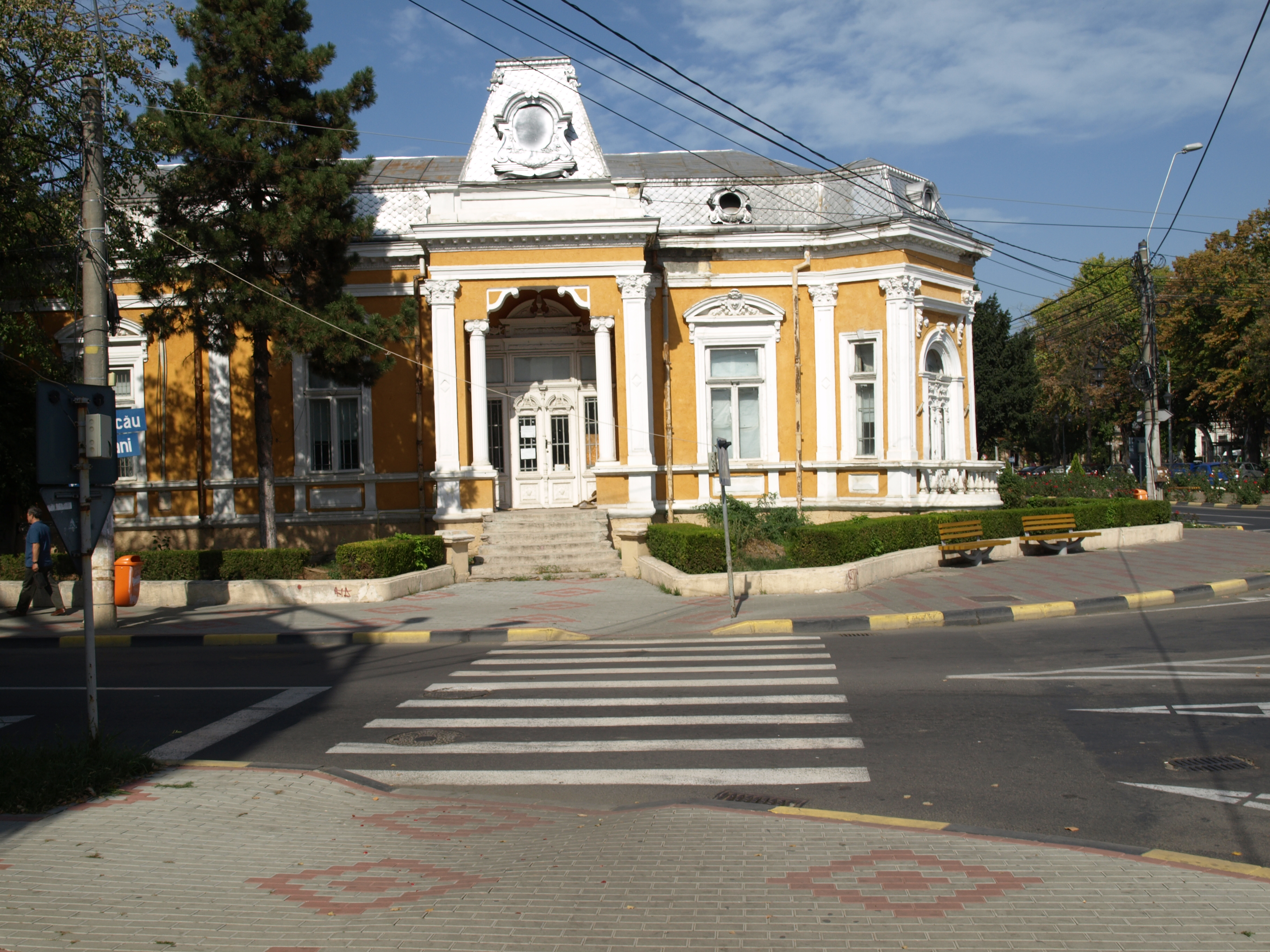 Casă in Tecuci